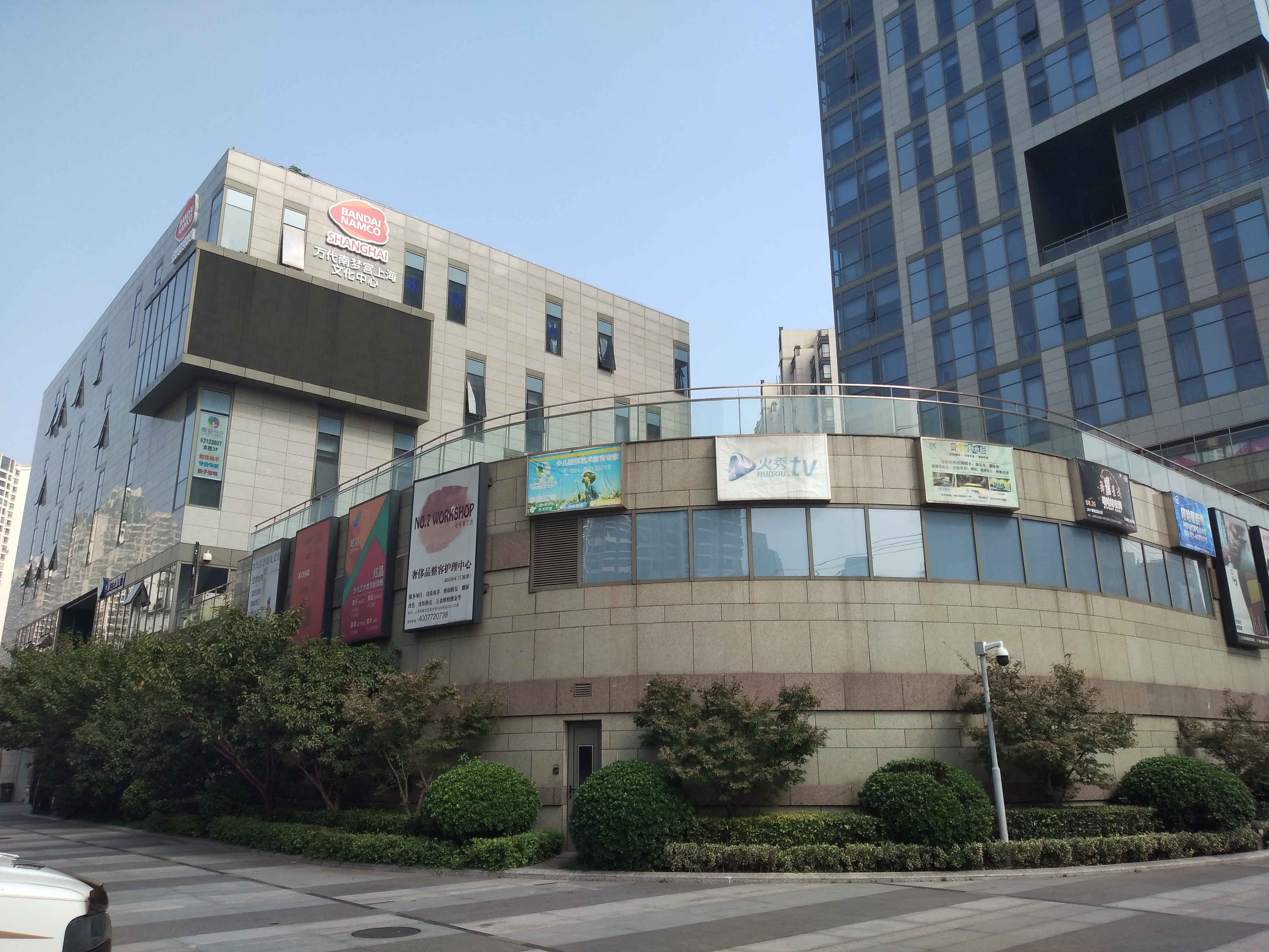 中文（中国大陆）: 浅水湾文化艺术中心